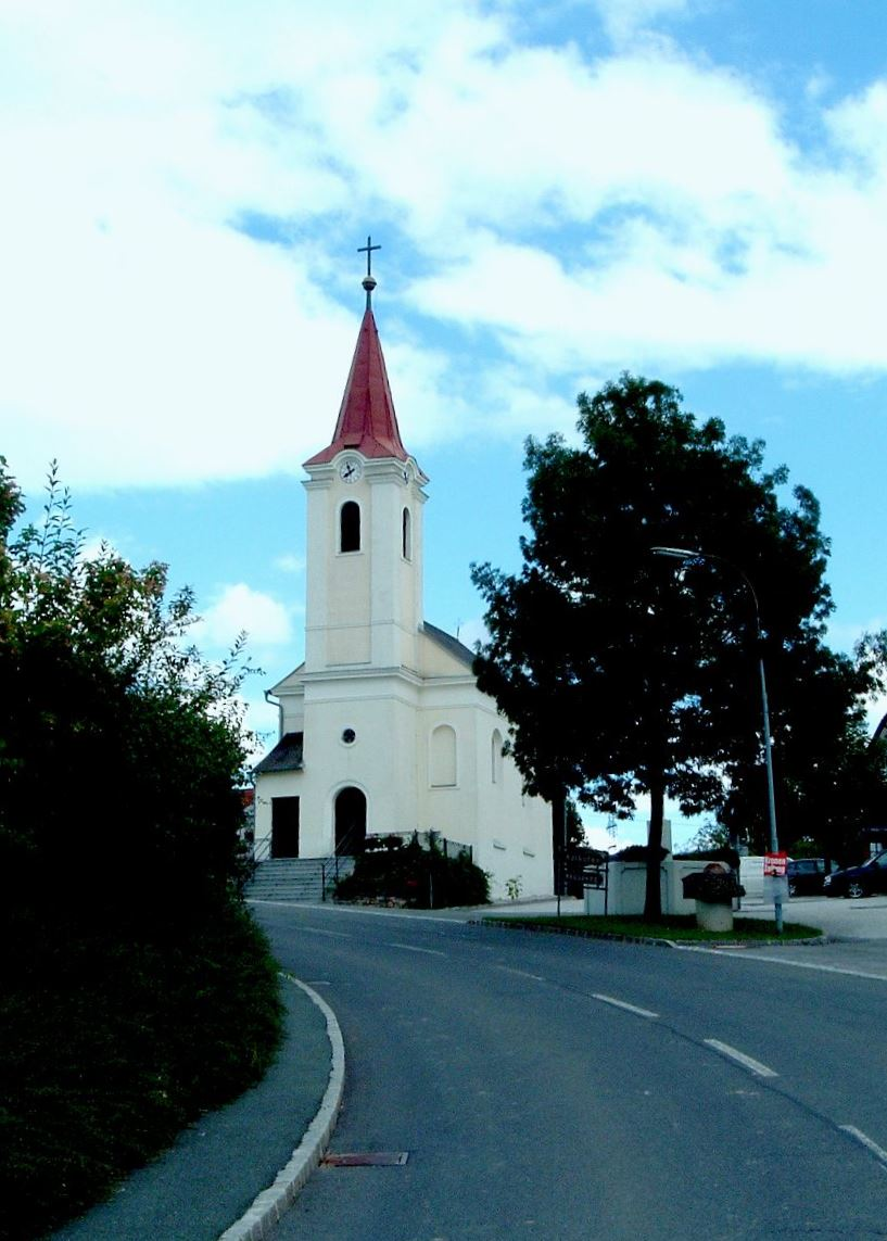 The church of Unterkohlstätten, Burgenland, Austria